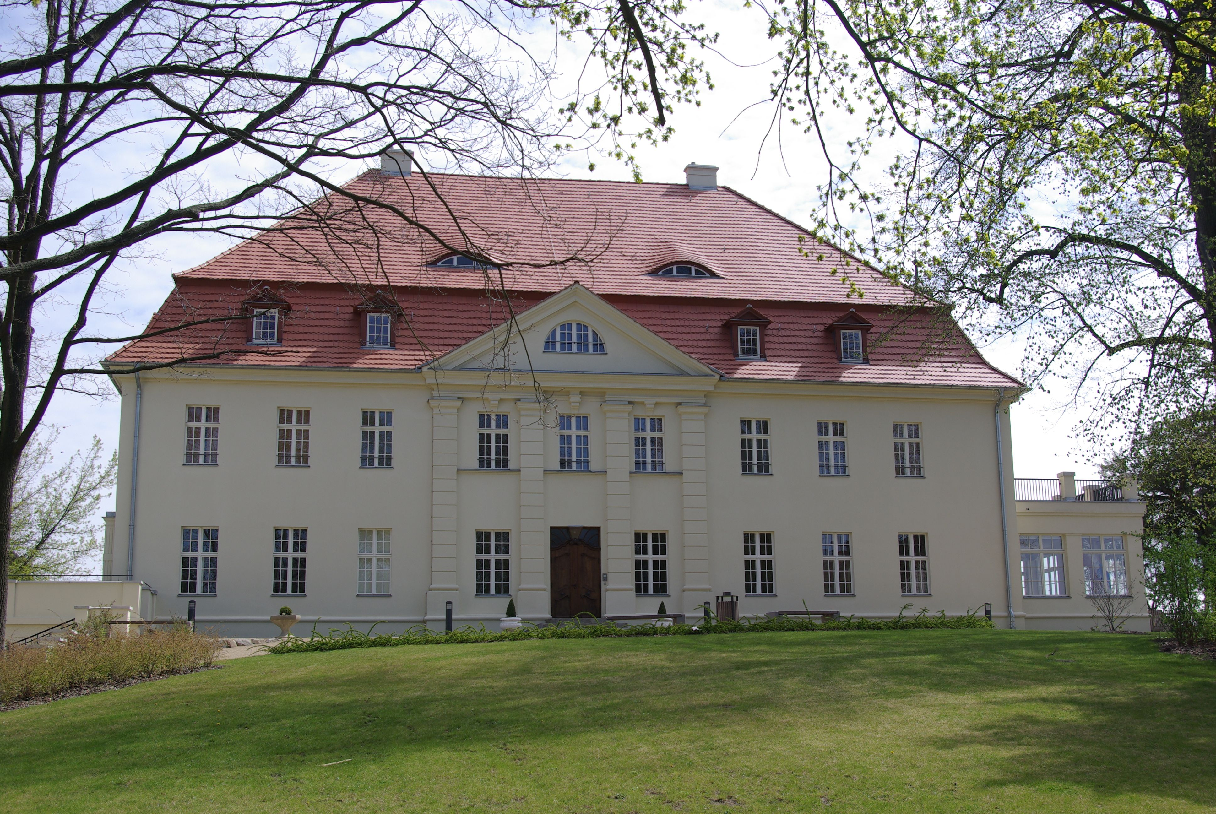 Brandenburg an der Havel, Ortsteil Gollwitz. Das Schloss steht unter Denkmalschutz.